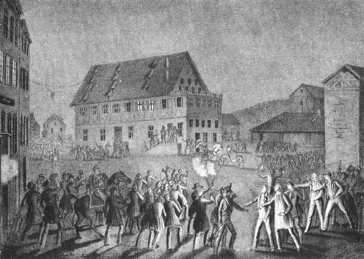 Sturm auf Schweickhardt'sche Kunstmühle am 4. Mai 1847 (Lithographie 160 × 223 mm); Schefold 9443